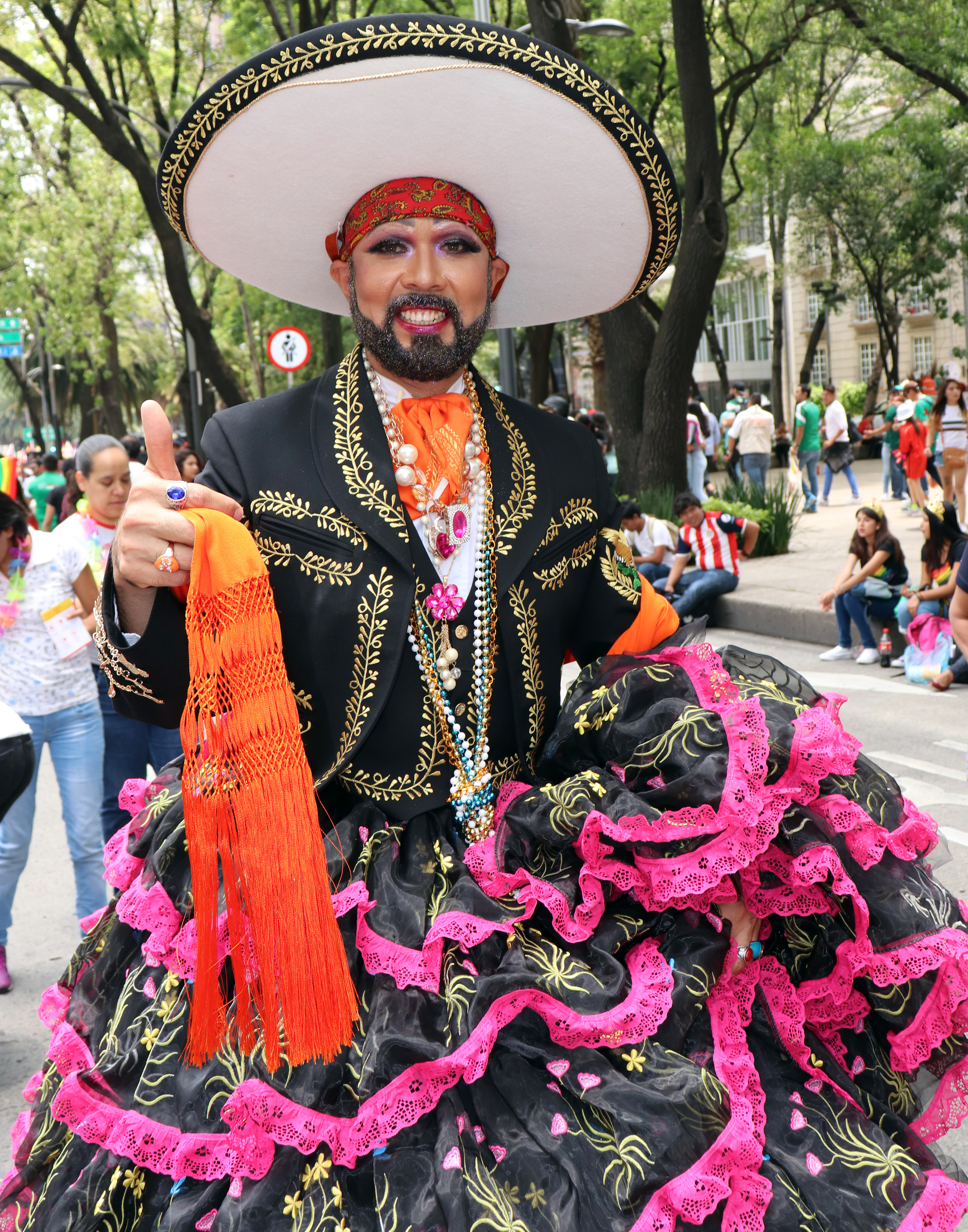 Símbolo varonil por antonomasia, este Mariachi utiliza enaguas de amplio vuelo y rebozo naranja, prendas femeninas por antonomasia. De esta forma, mezcla los elementos masculinos y femeninos tradicionales para marchar por el Paseo de la Reforma en la Marcha del Orgullo LGBTTI de junio de 2018.